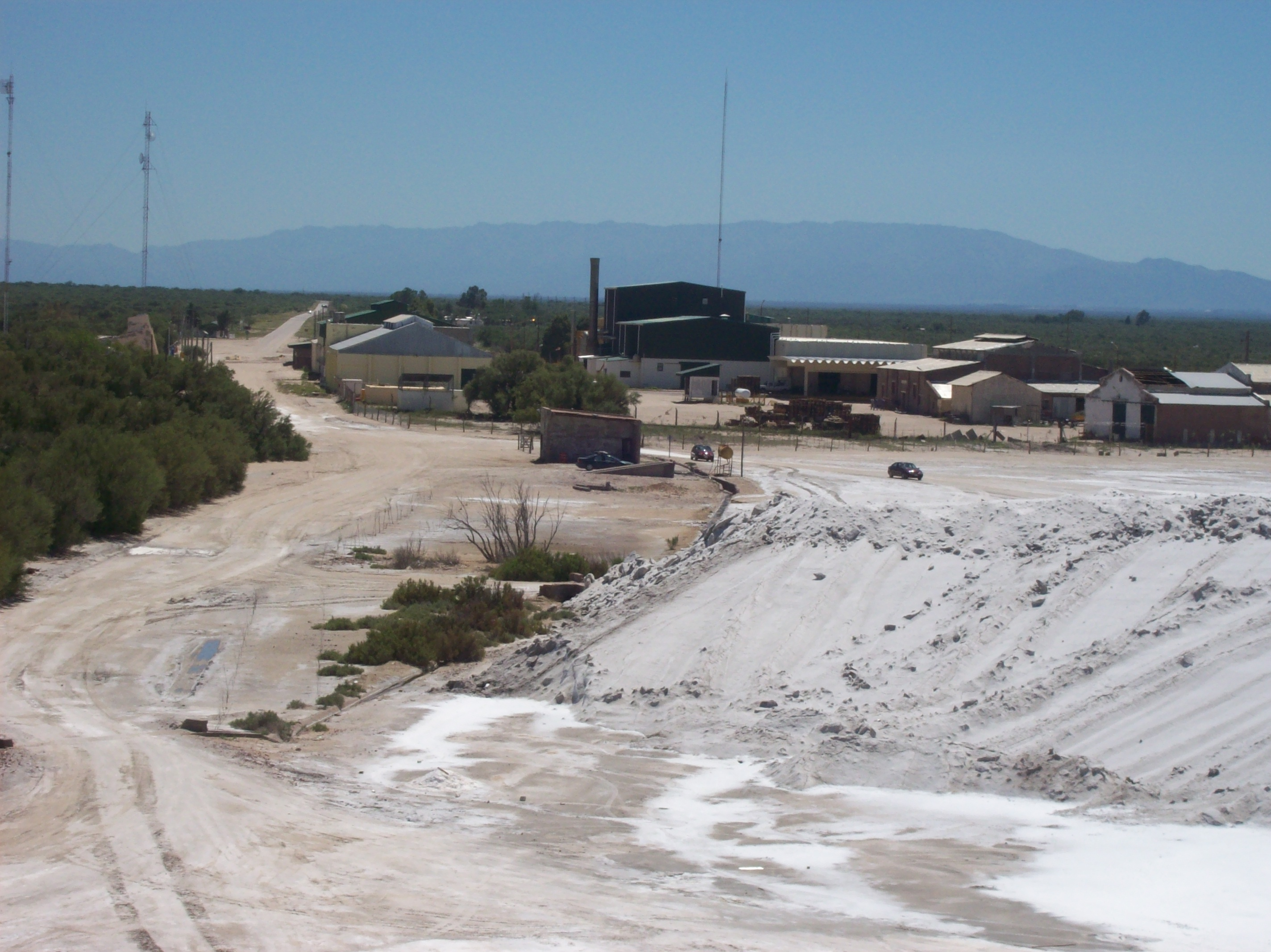 Planta elaboradora de sal en Salinas del Bebedero, Departamento Capital, Provincia de San Luis, Argentina.